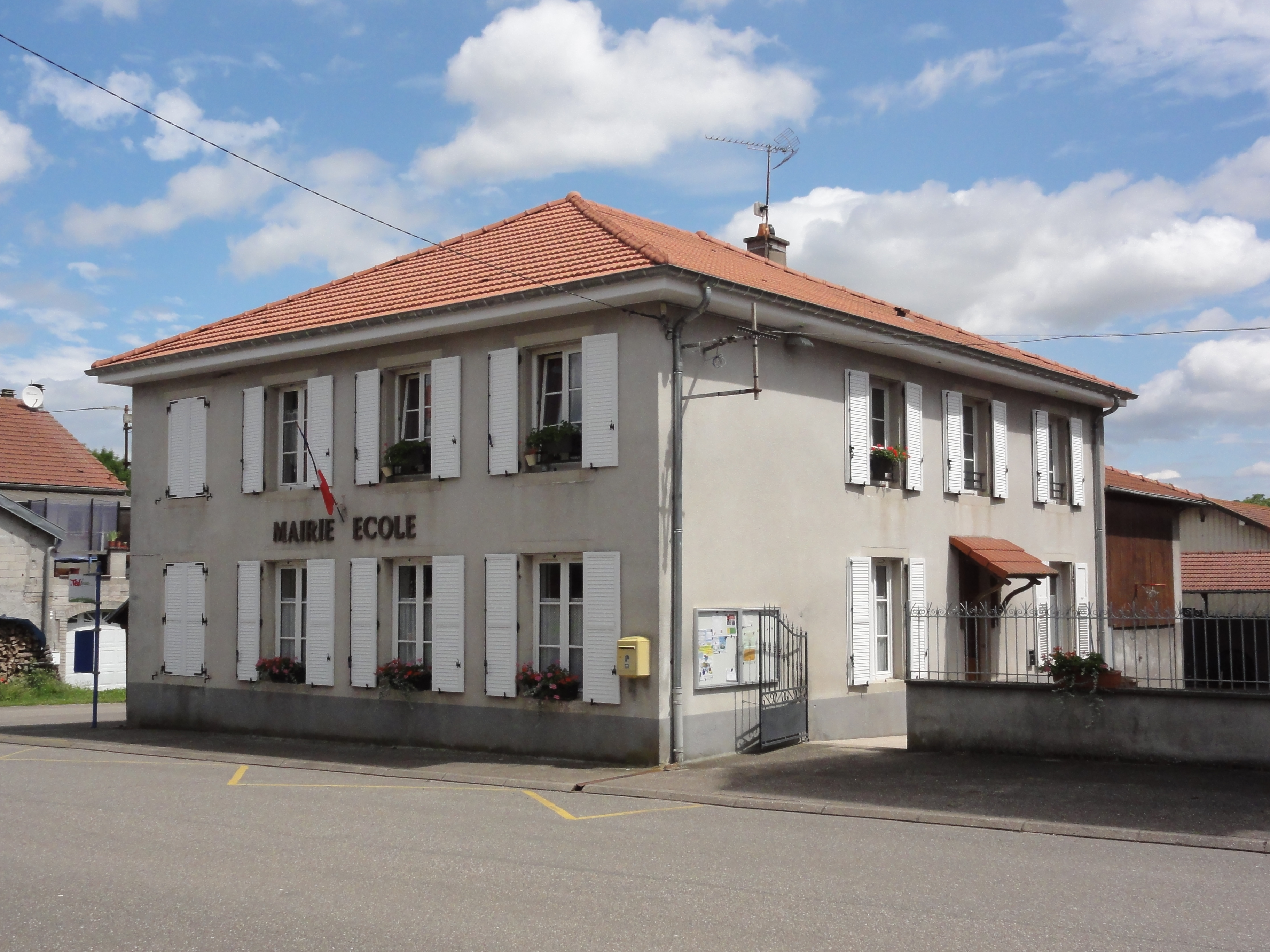 Bezange-la-Grande (M-et-M) mairie - école